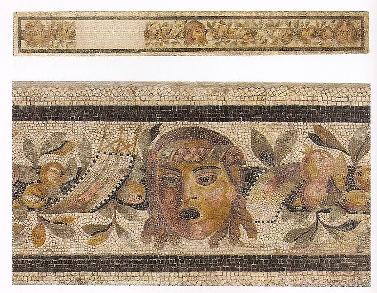 Soglia di domus romana. Datazione: metà I secolo a.C. Materiale: mosaico policromo (cm 50,8 x 407). Provenienza: Imola, scavi della domus di via San Pier Crisologo (1985).